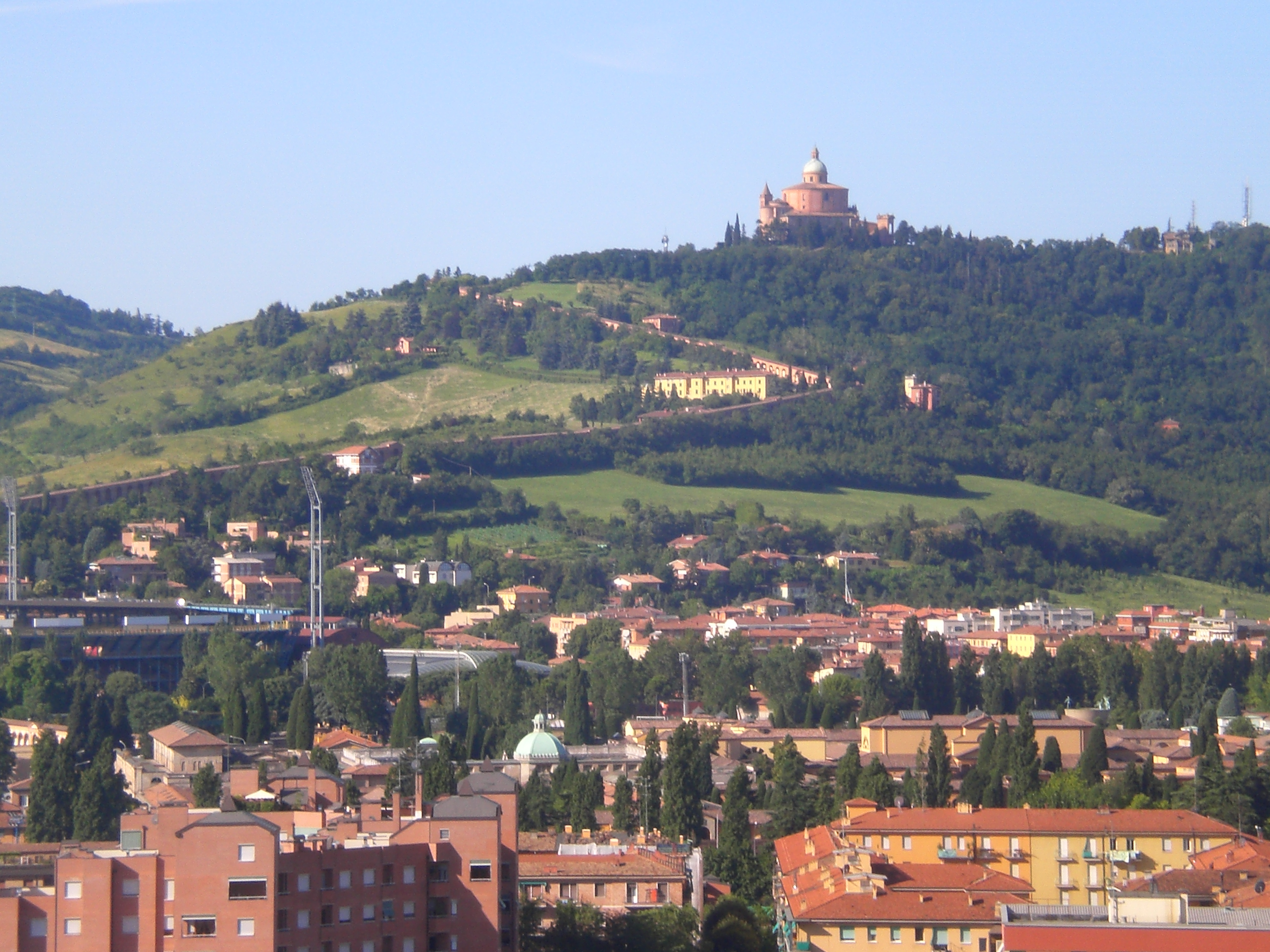 San Luca (vista dal Maggiore)